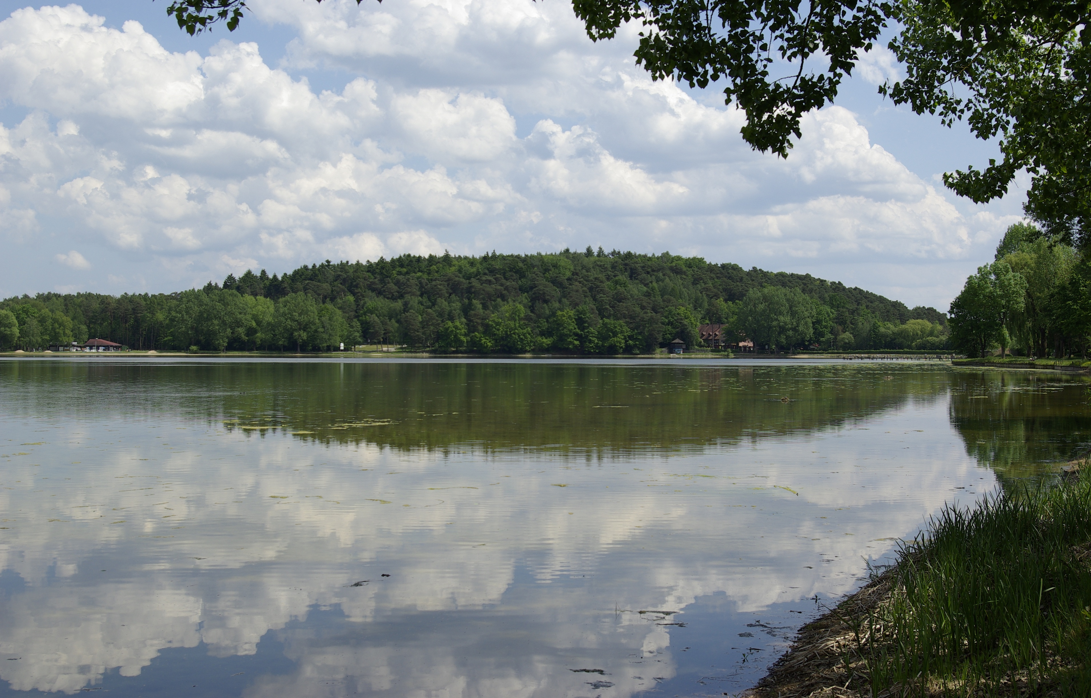 Blick vom südwestlichen Ufer über den Großen Bischofsweiher (Dechsendorfer Weiher), im Hintergrund der Hintere Giesberg im Staatsforst Mark.